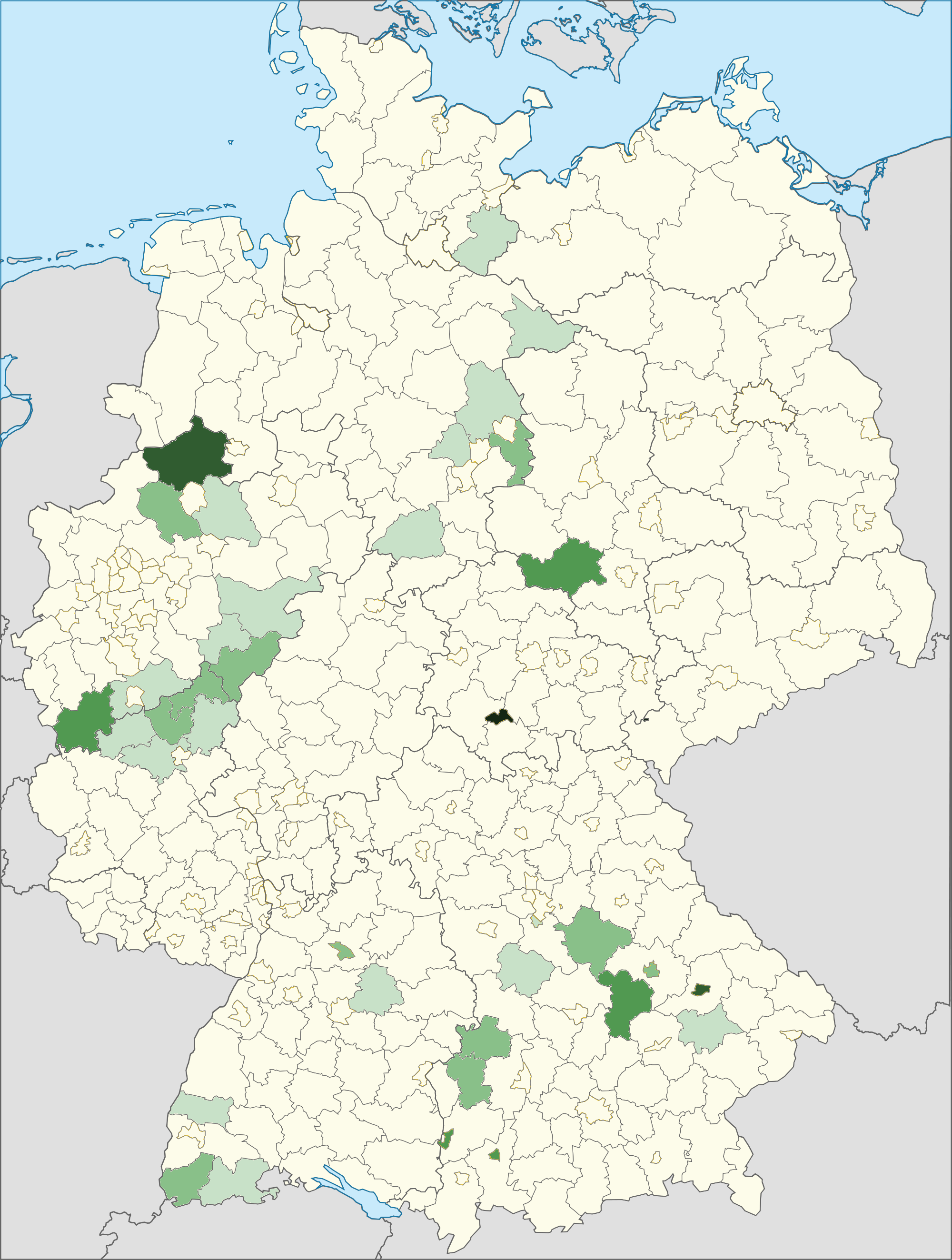 Karte der Personen mit kosovarischer Staatsangehörigkeit und deren relativer Häufigkeit in den Landkreisen 2014. Dunkelgrün: häufigste ausländische Staatsangehörigkeit in diesem Kreis, hellgrün: fünfthäufigste ausländische Staatsangehörigkeit in diesem Kreis, weiß: sechsthäufig oder weniger. Quelle: Ausländerzentralregister, Stand 31. Dezember 2014. Saarland: keine Daten auf Kreisebene (dargestellt ist die Landesebene). Deutschlandweite relative Häufigkeit der ausländischen Staatsangehörigkeit Kosovo: Platz 9.